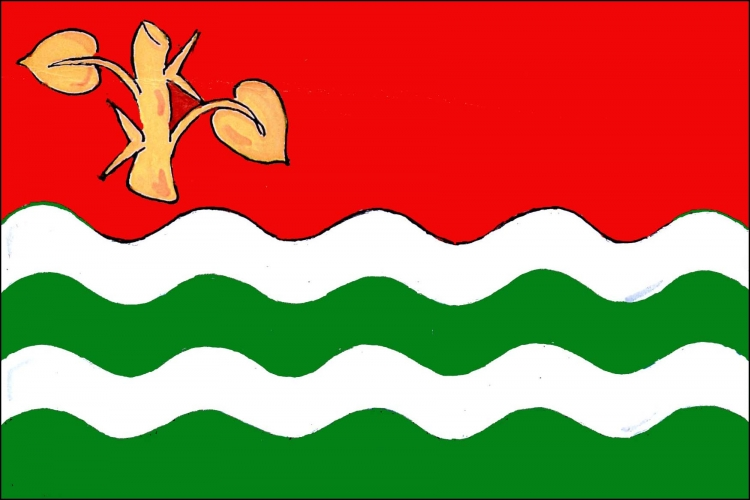 vlajka, Trnov, okres Rychnov nad Kněžnou